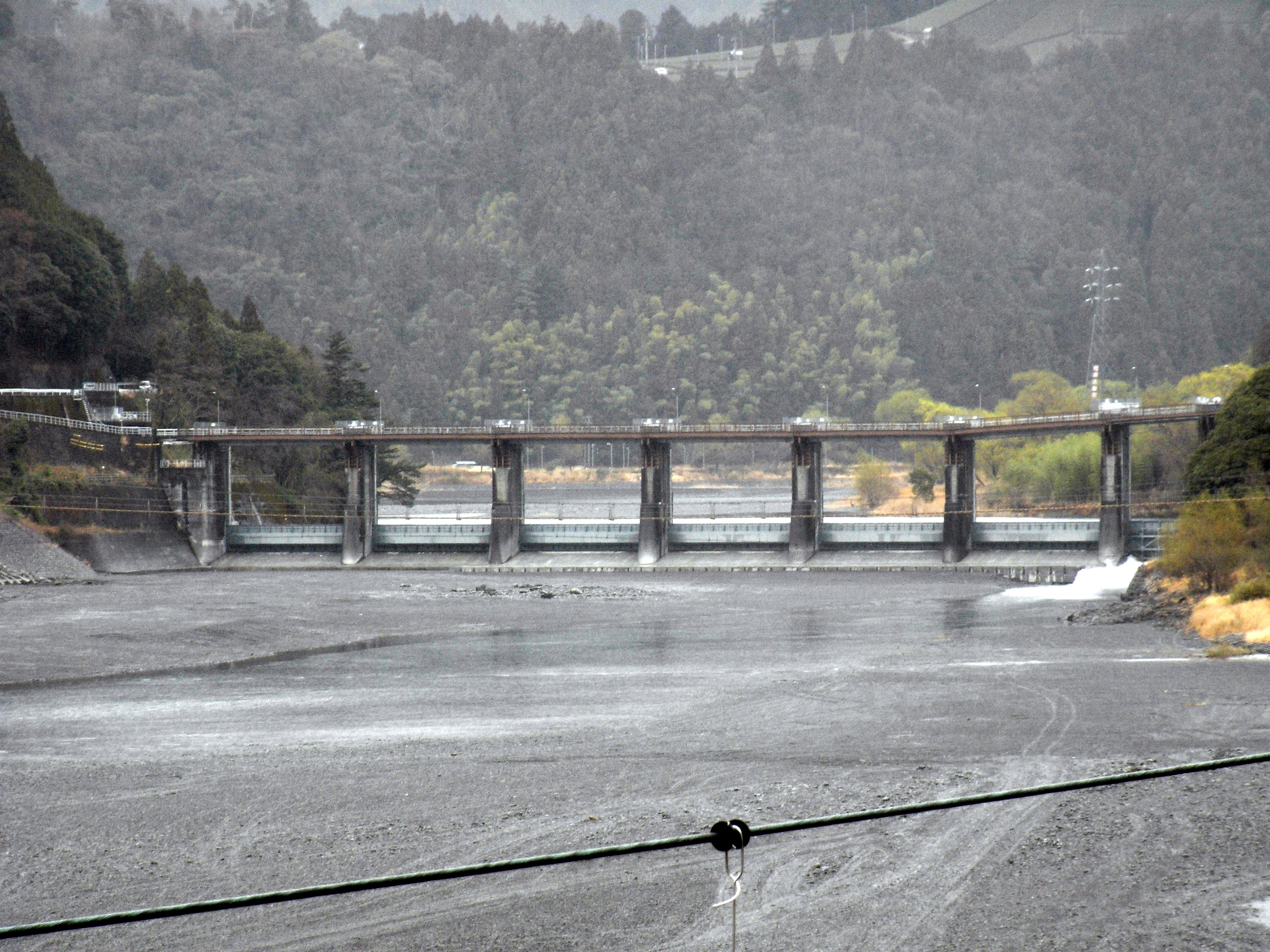 Dam